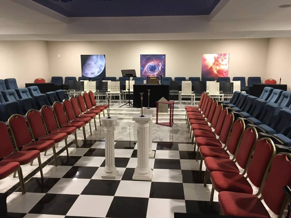 Templo "Roger Leveder" de la sede central de la Gran Logia Simb´polica Española, en la calle Vallès nº 87 de Barcelona